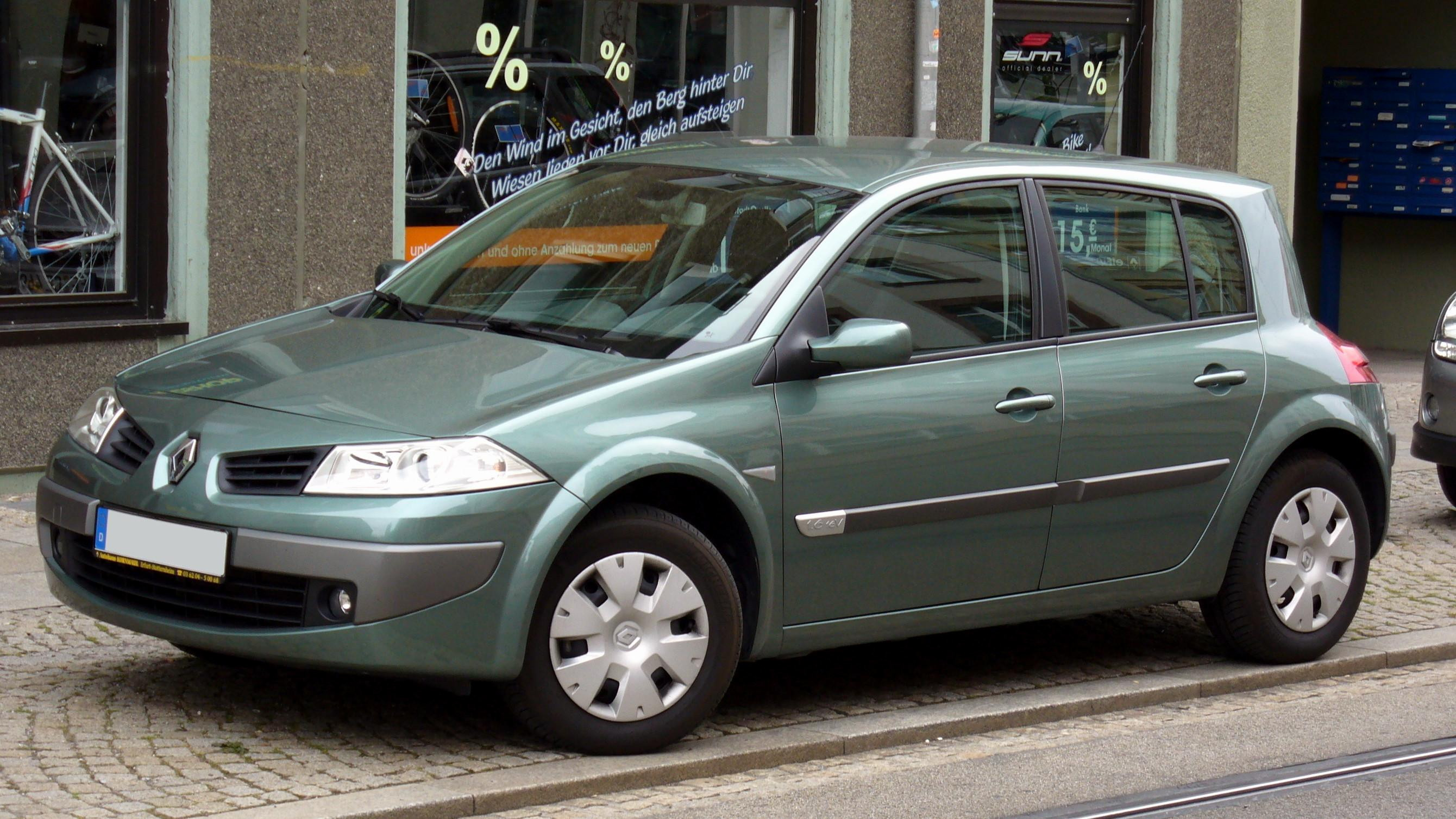 Renault Mégane Facelift